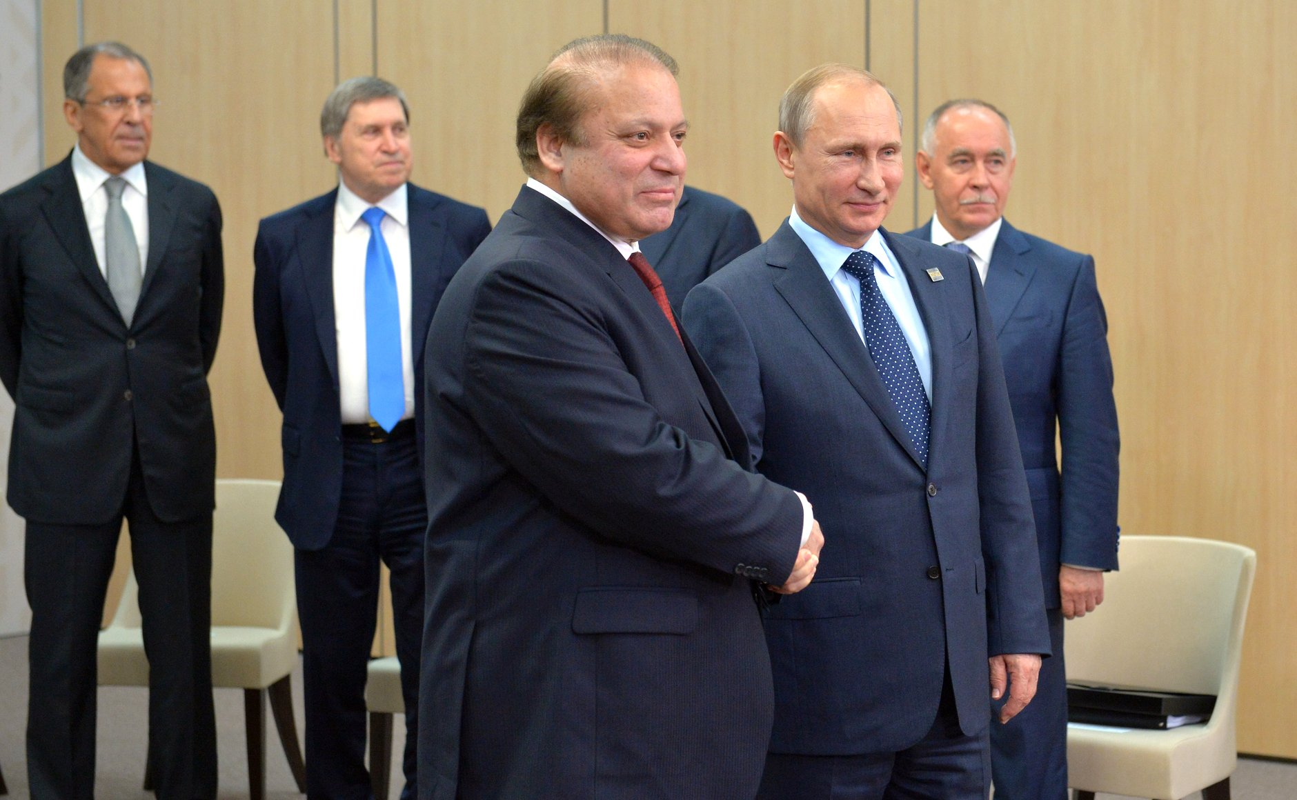 Встреча Президента России Владимира Путина с Премьер-министром Исламской Республики Пакистан Навазом Шарифом